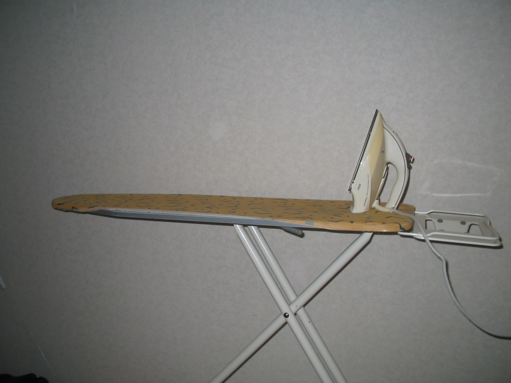 Bügelbrett und Bügeleisen